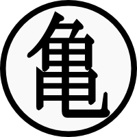 Logotipo de la escuela Kame de artes marciales del manga Dragon Ball